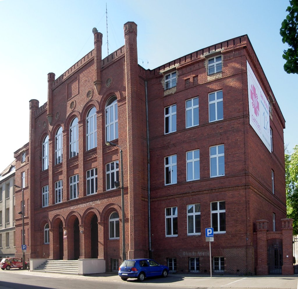 Budynek Seminarium Duchownego w Bydgoszczy, 1858 r.